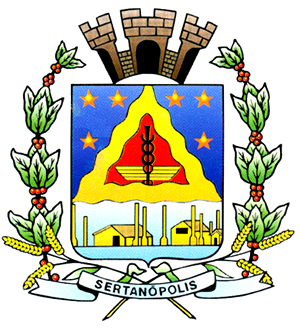 Braqsão do municipio de Sertanopolis PR Brasil